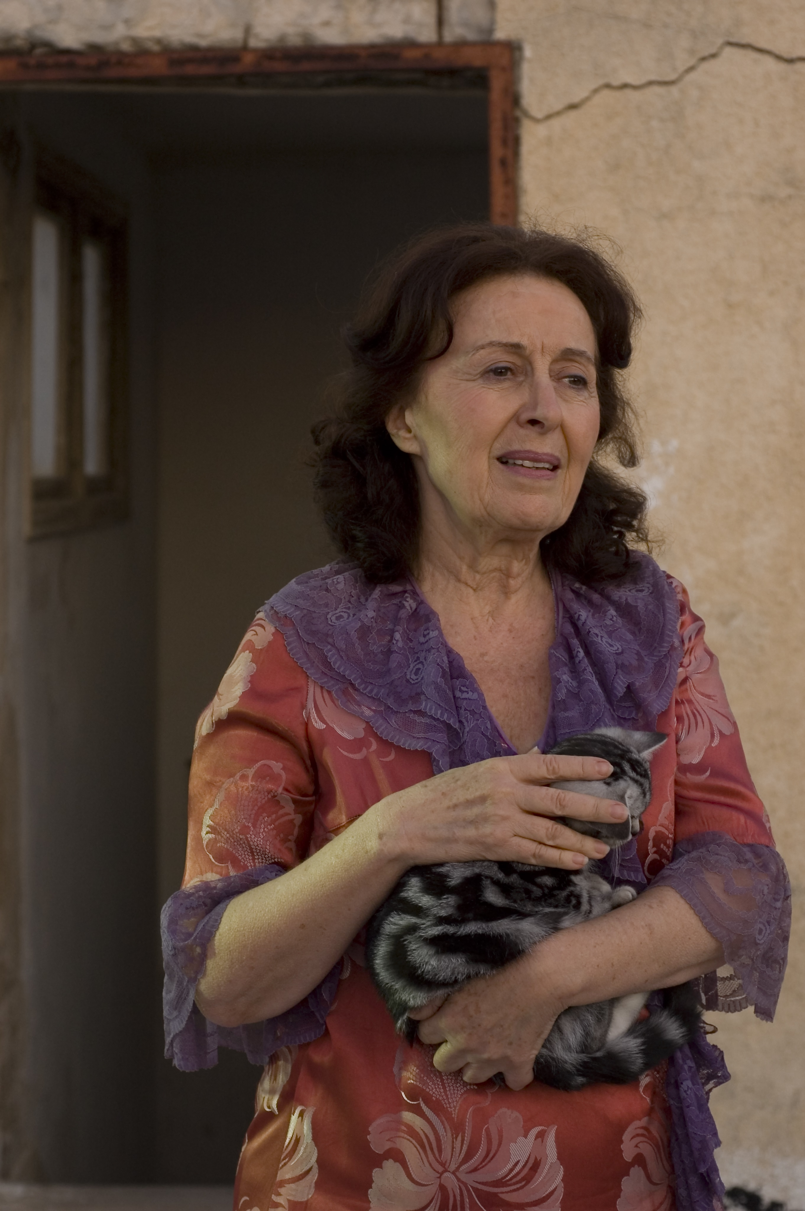 ריטה זהר בסרט "בדרך אל החתולים", 2009